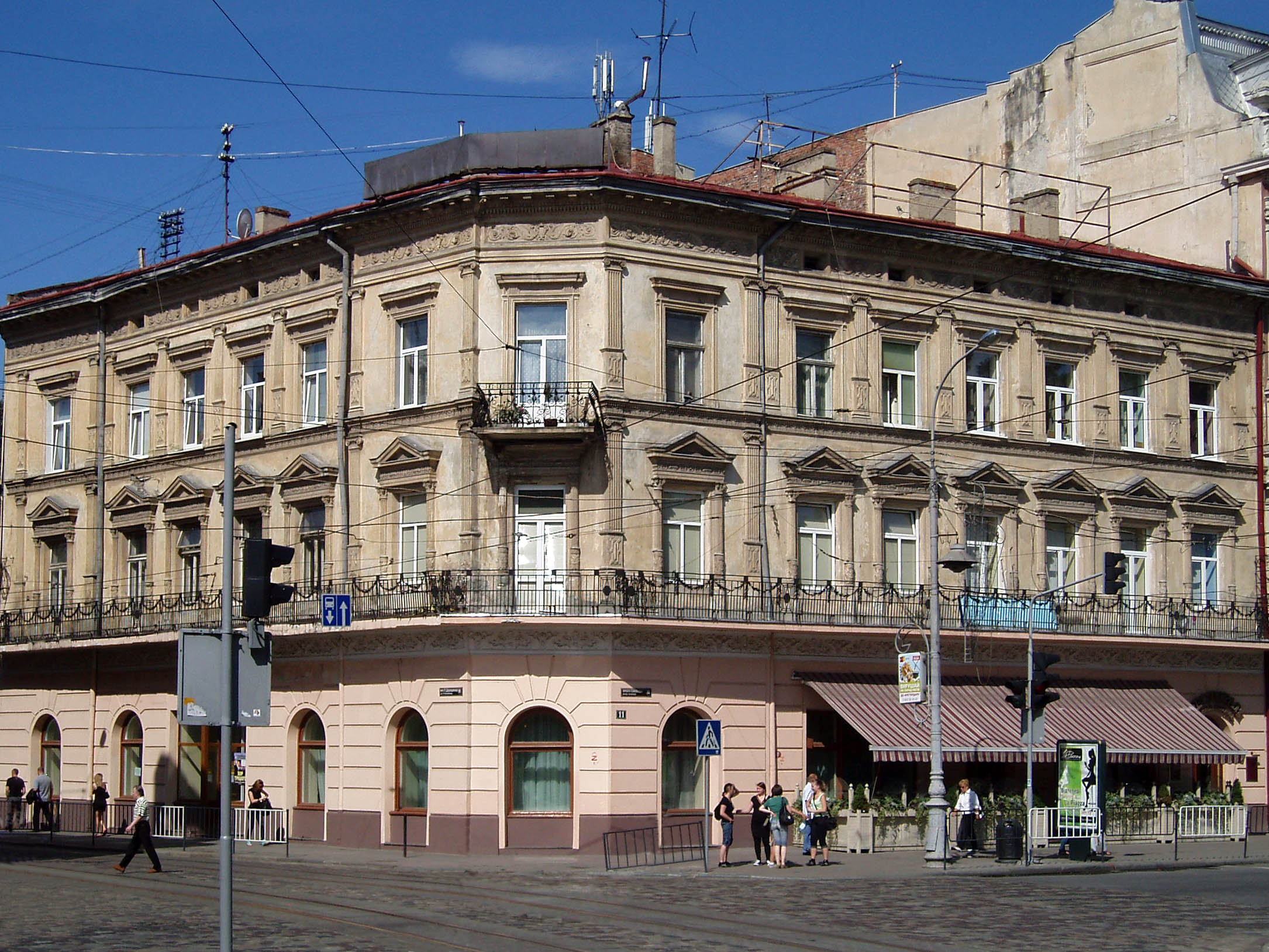 Будинок № 11 на проспекті Свободи у Львові. Колишній готель центральний, збудований у 1881-1884 роках за проектом Емануеля Галля.